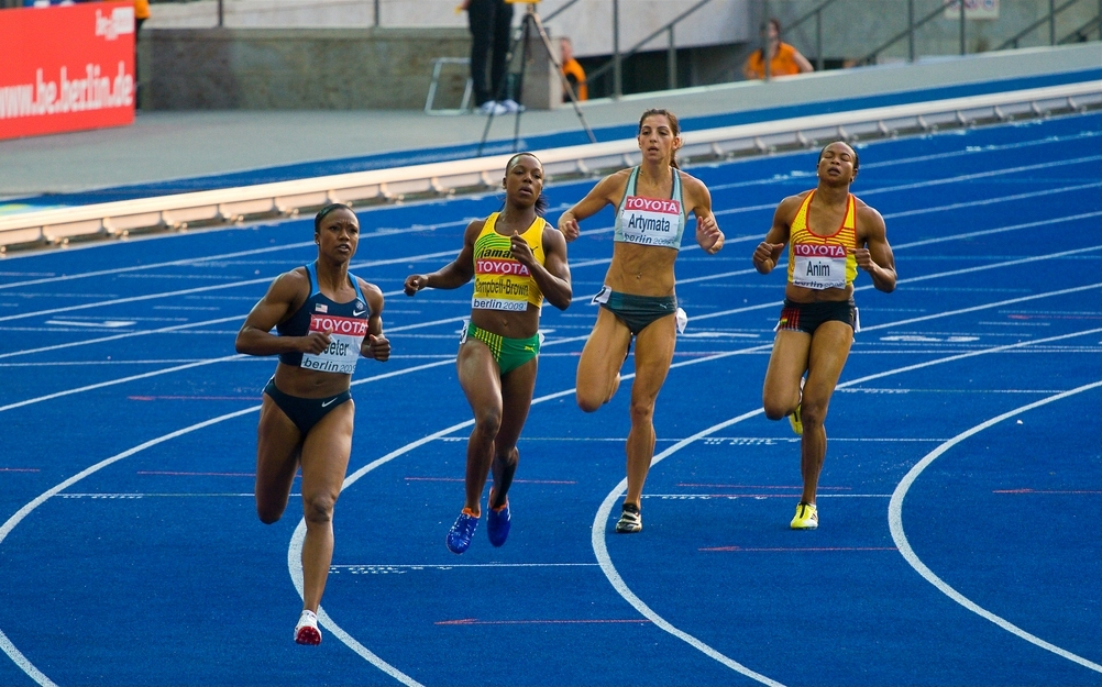 Zieleinlauf 100m Halbfinale